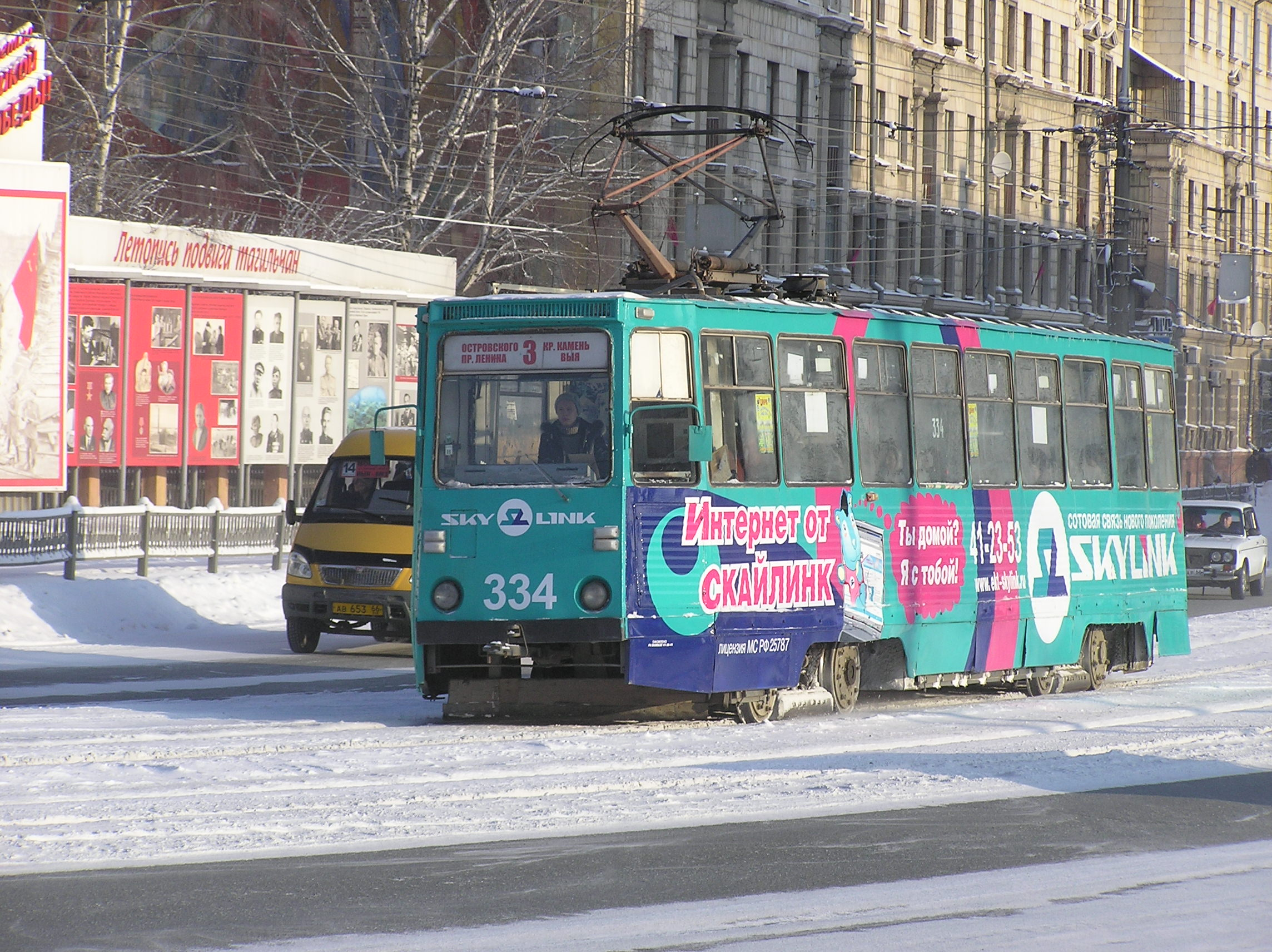 Tramway in Nizhny Tagil, Lenin Prospekt